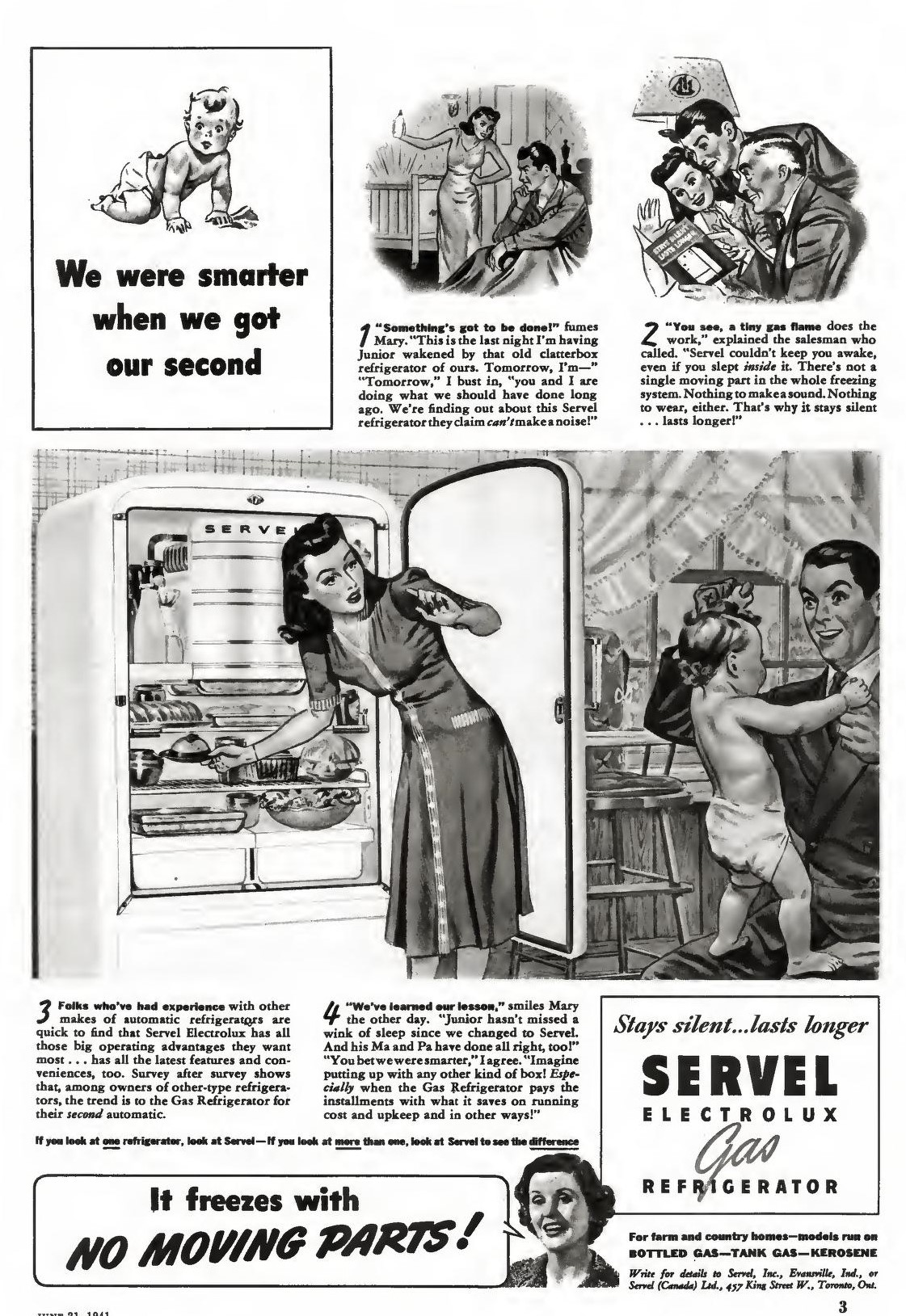 Servel Electrolux Gas Refrigerator ad, 1941